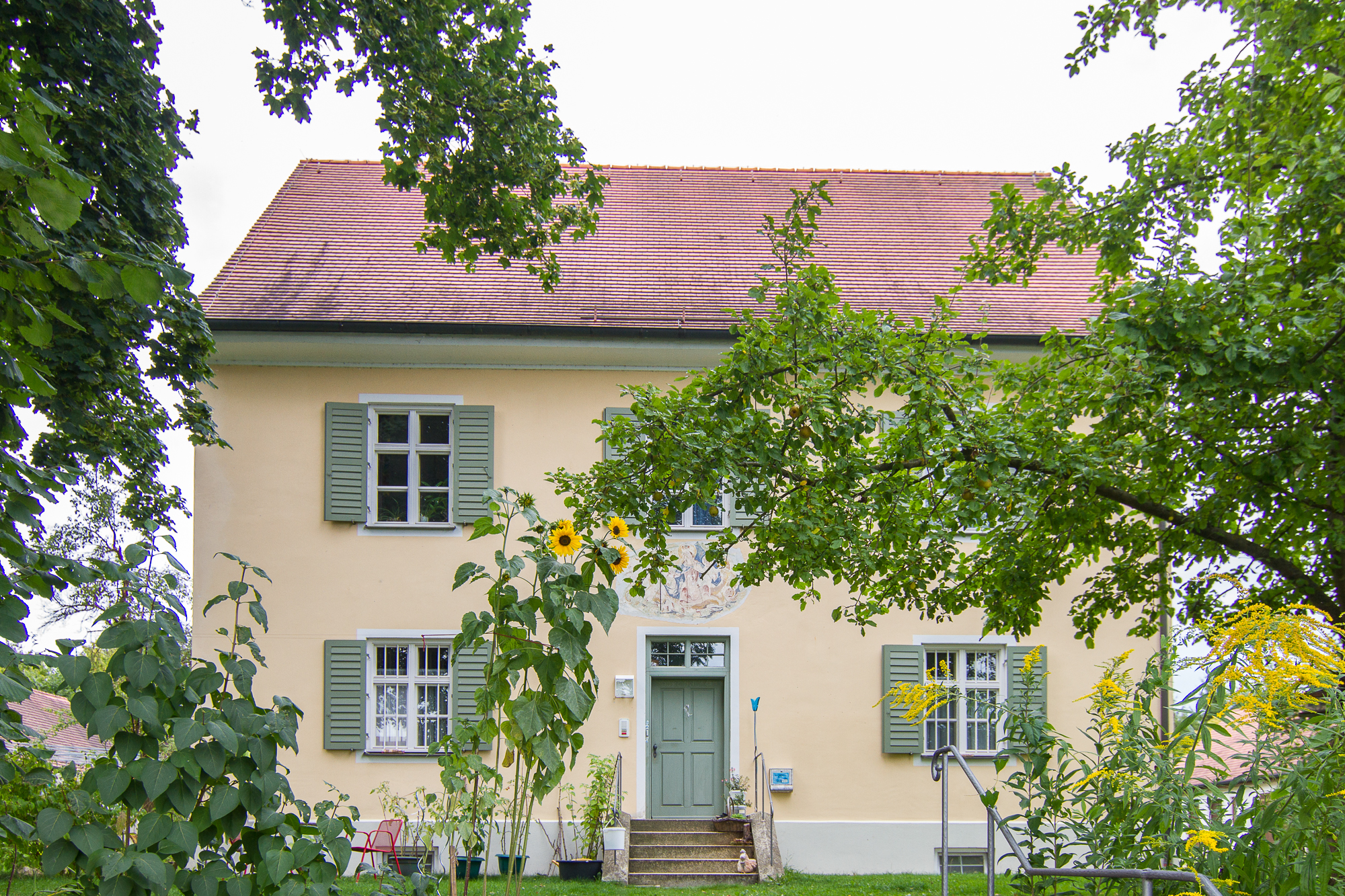 Pfarrhaus wohl 18. JahrhundertThis is a photograph of an architectural monument.